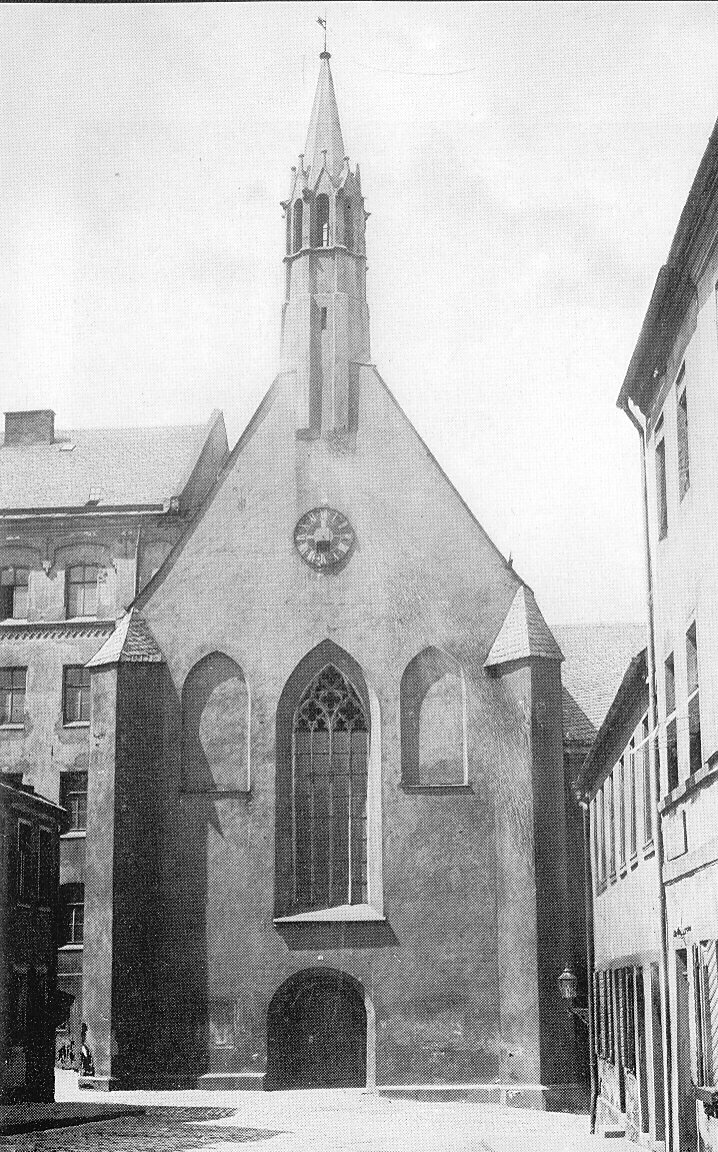 Ostseite der Klosterkirche